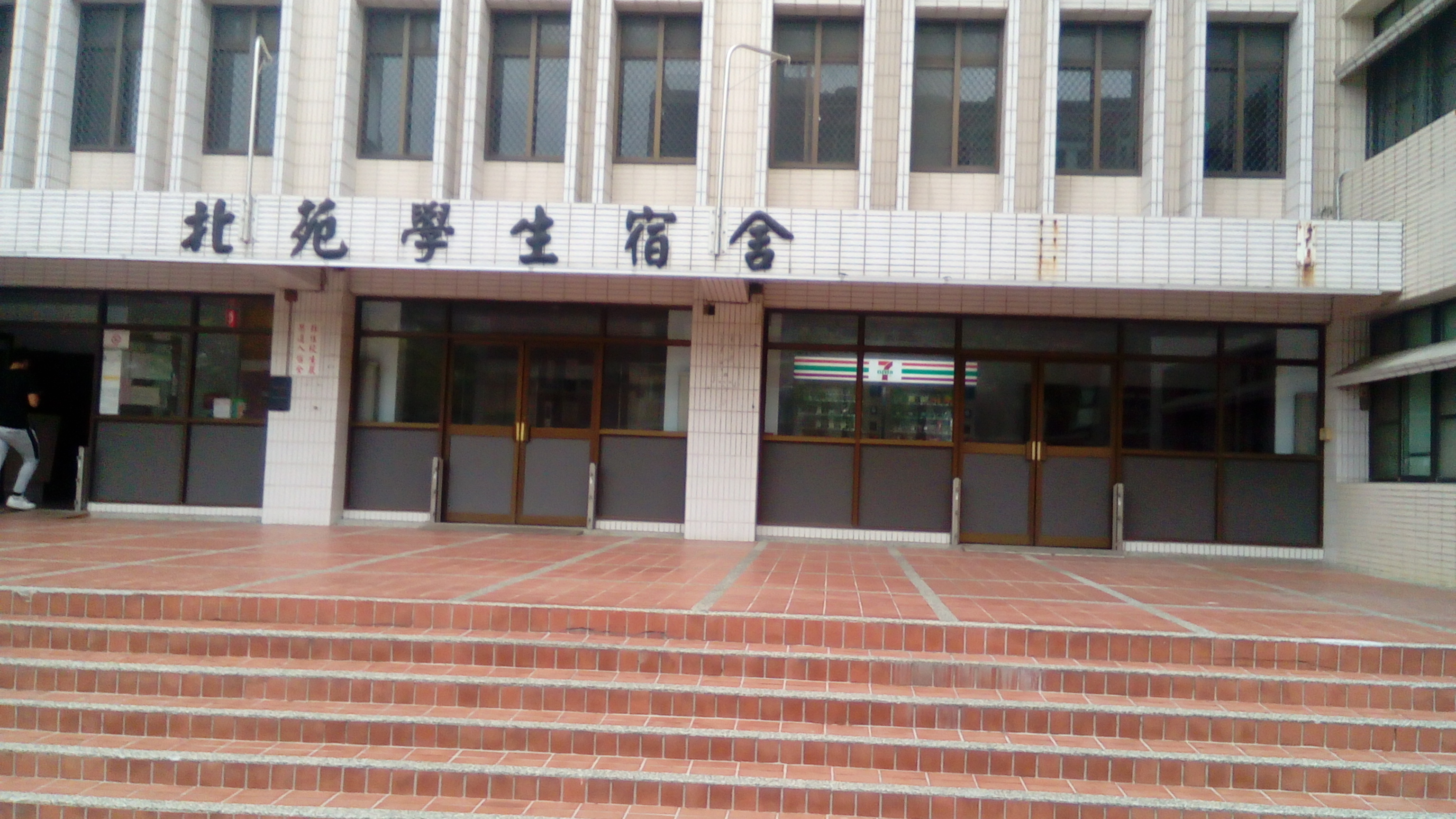 中文（台灣）: 崑山科技大學北苑學生宿舍，自動販賣機型的7-11